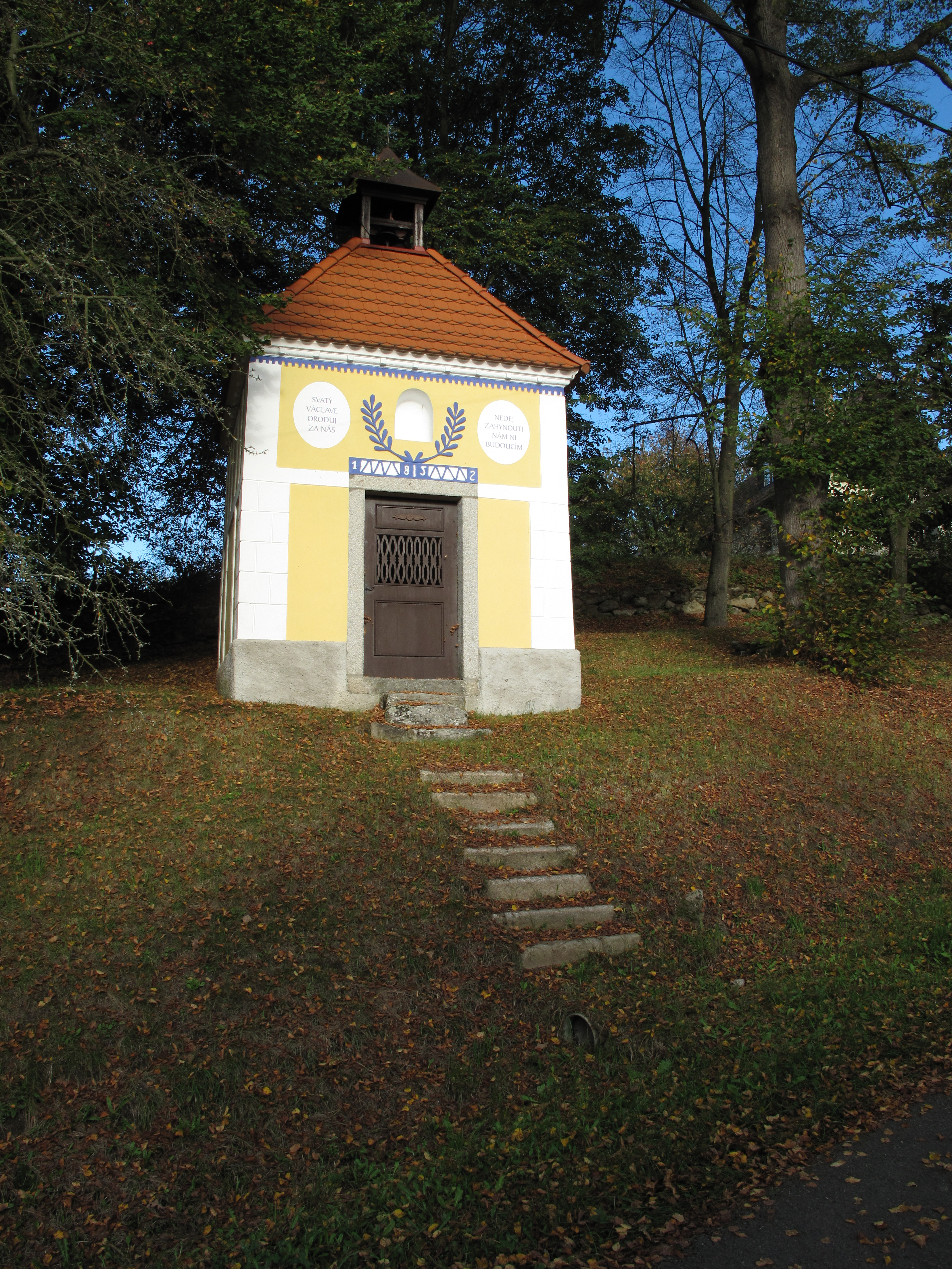 Kaplička v Radči. Okres Příbram, Česká republika.